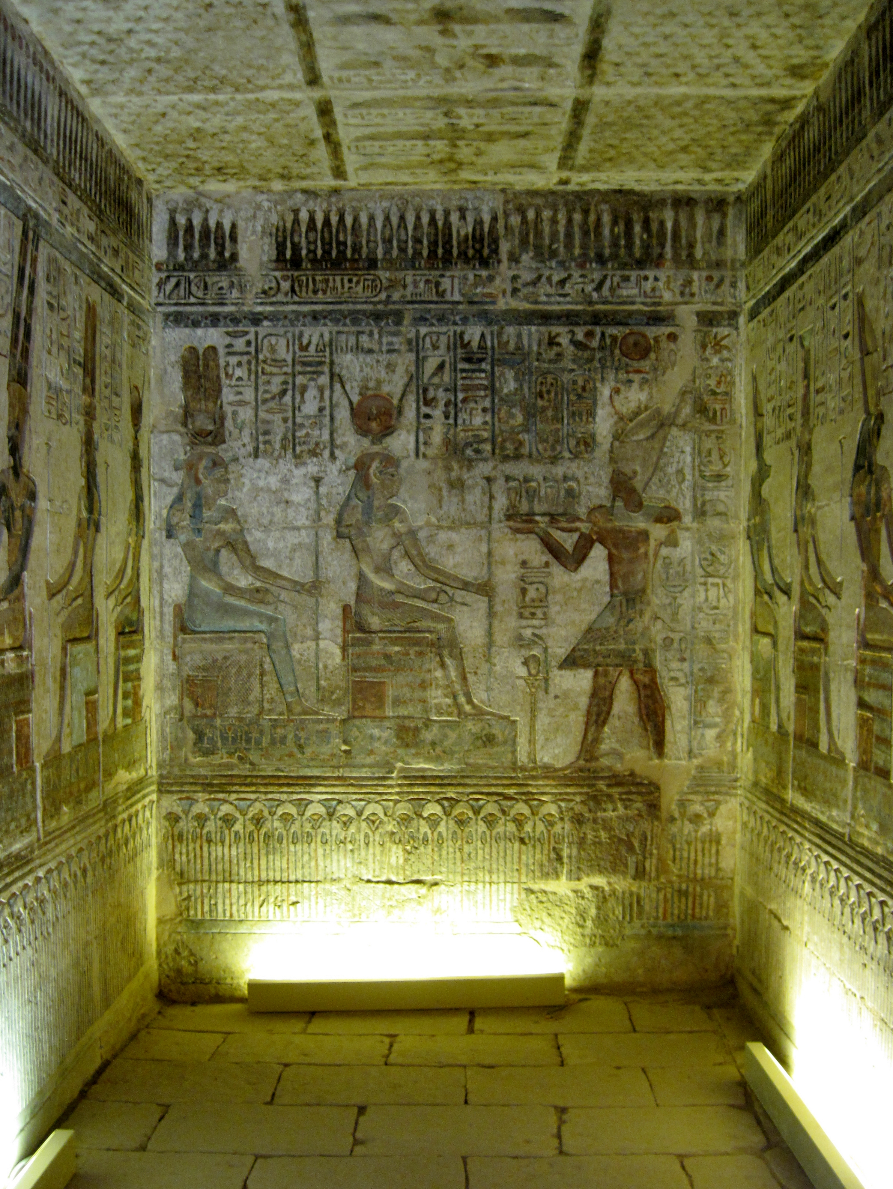 Nordostkapelle für Amun-Re-Osiris im Hathor-Tempel von Deir el-Medina („Kloster der Stadt“), altägyptisch Set Maat („Platz der Wahrheit“), in Theben-West bei Luxor, Ägypten